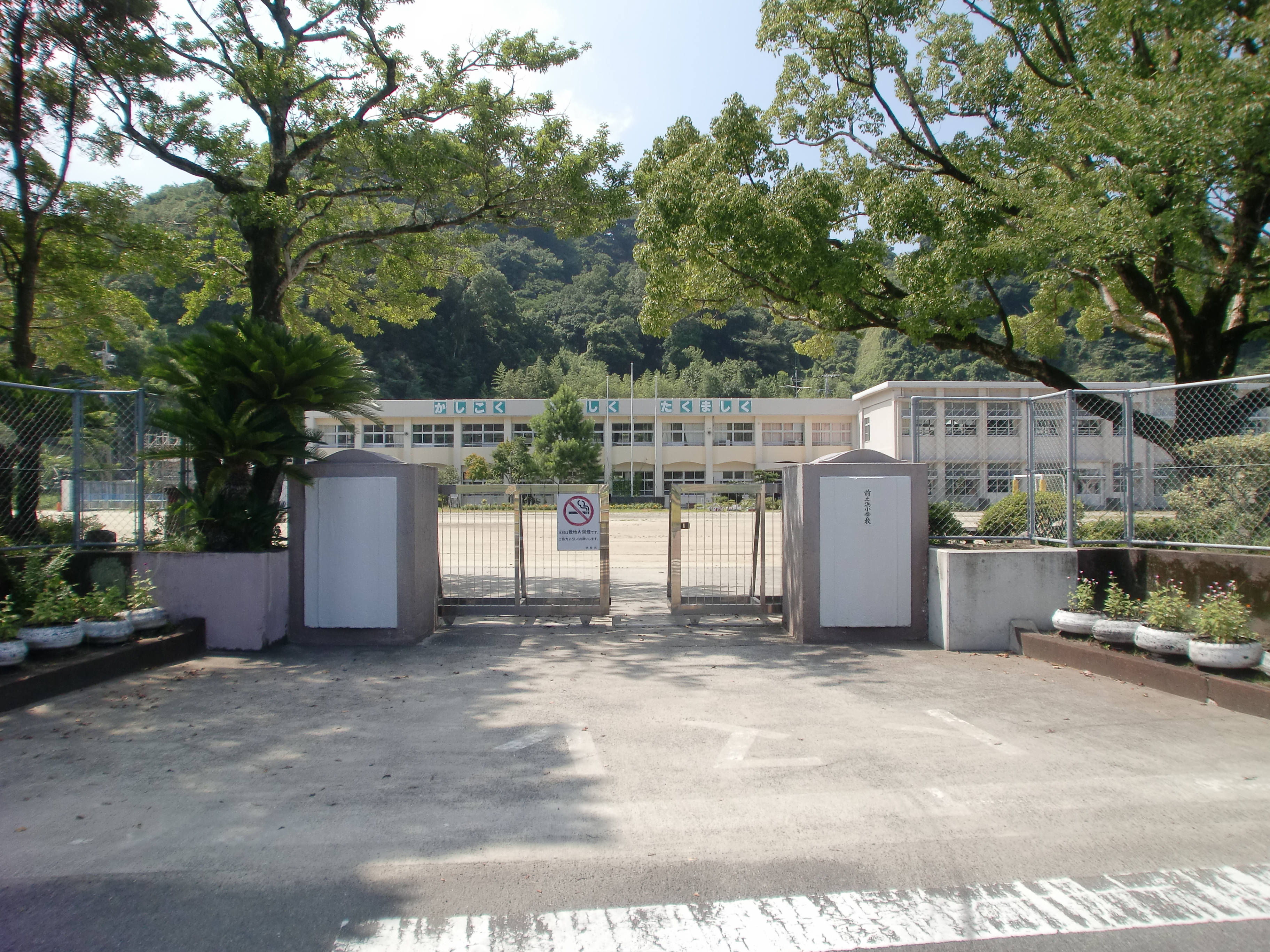 鹿児島市立前之浜小学校の外観。